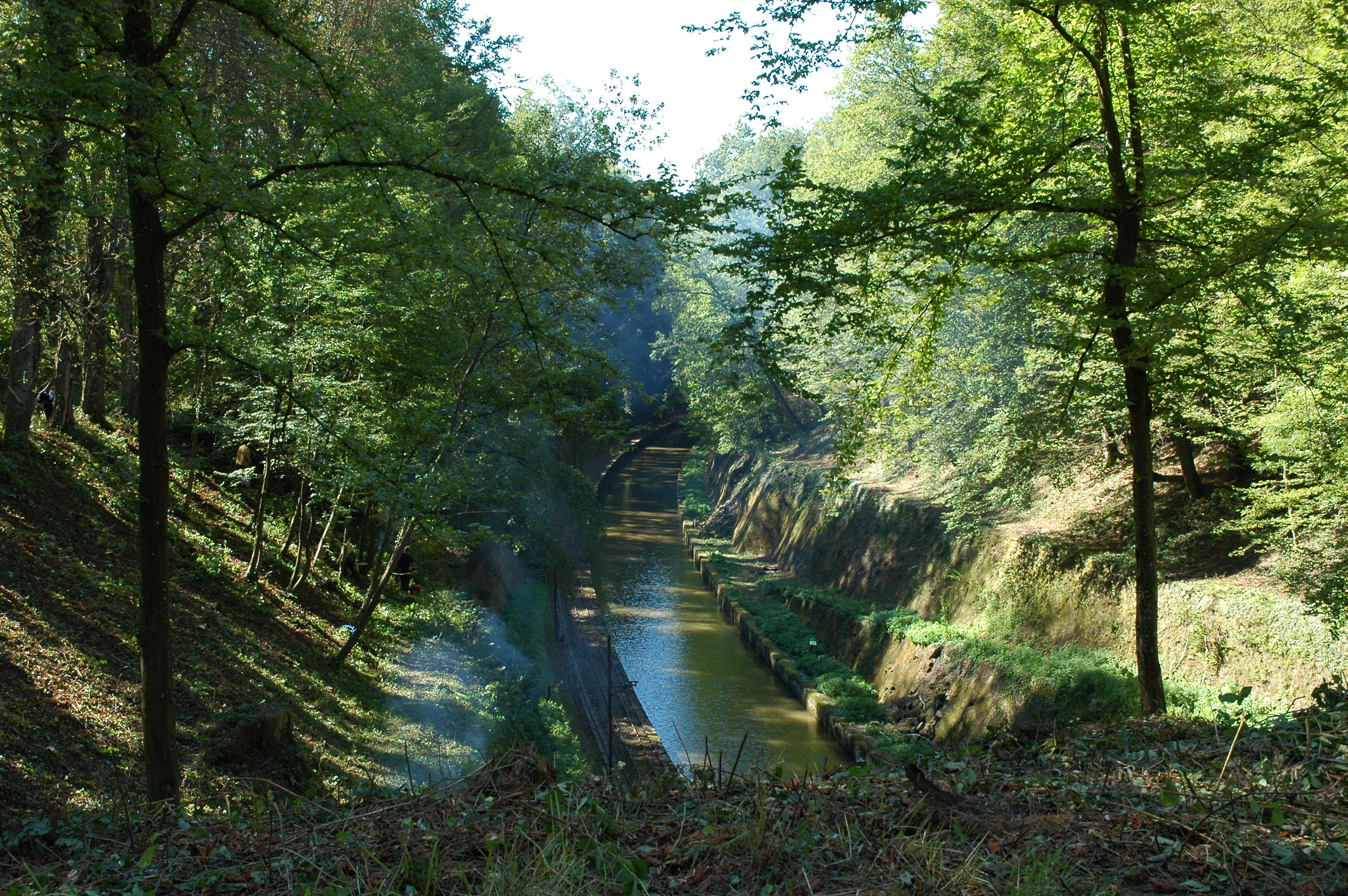 Der Rhein-Marne-Kanal am westlichen Tunnelausgang bei Niderviller, Moselle